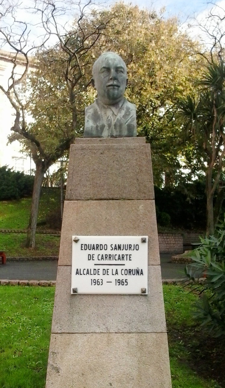 Monumento a Eduardo Sanjurjo de Carricarte na Coruña